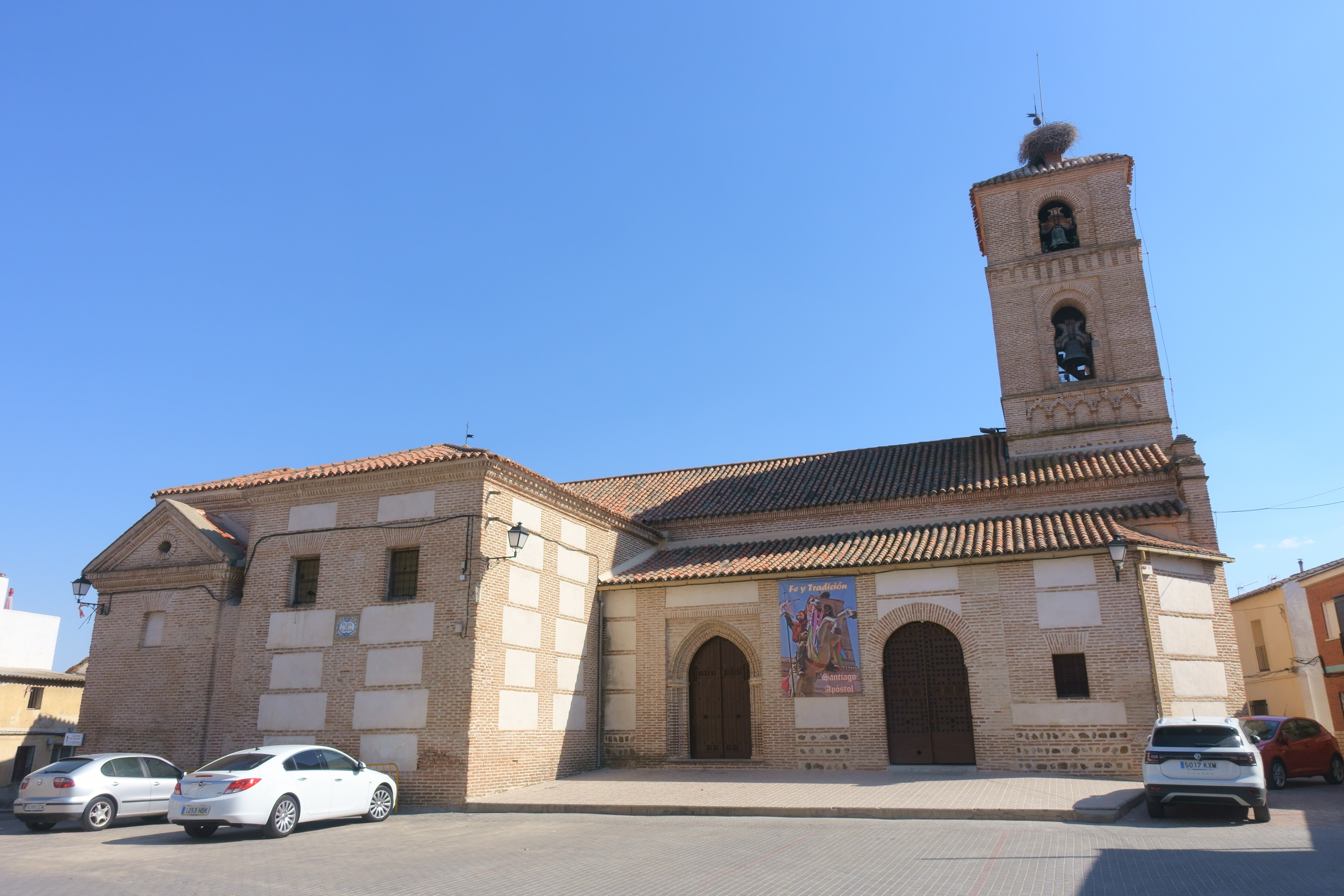 Iglesia de San Miguel Arcángel, El Carpio de Tajo (Toledo, España).